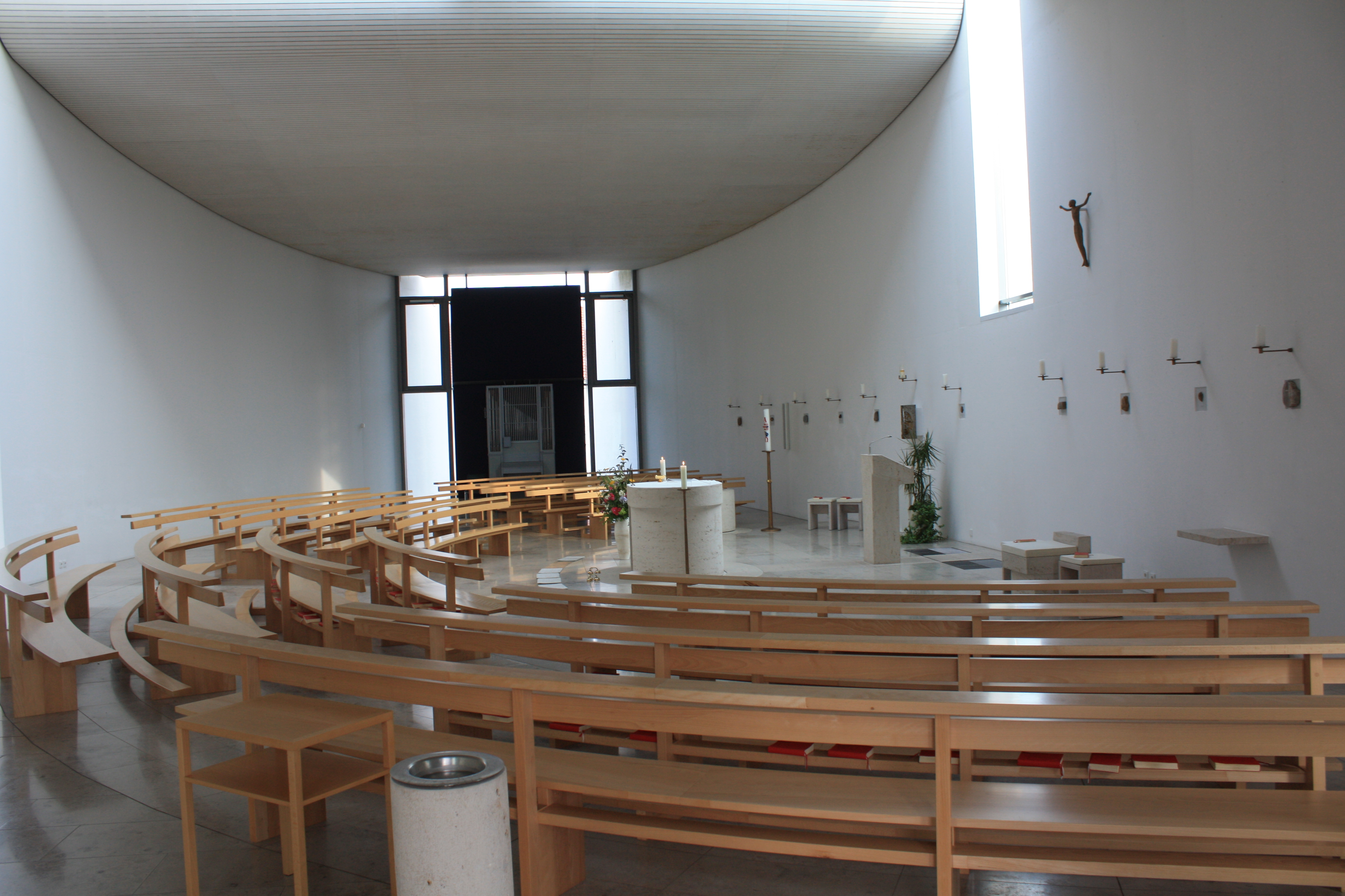 Innenraum von St. Johannis Baptist in Leopoldshöhe